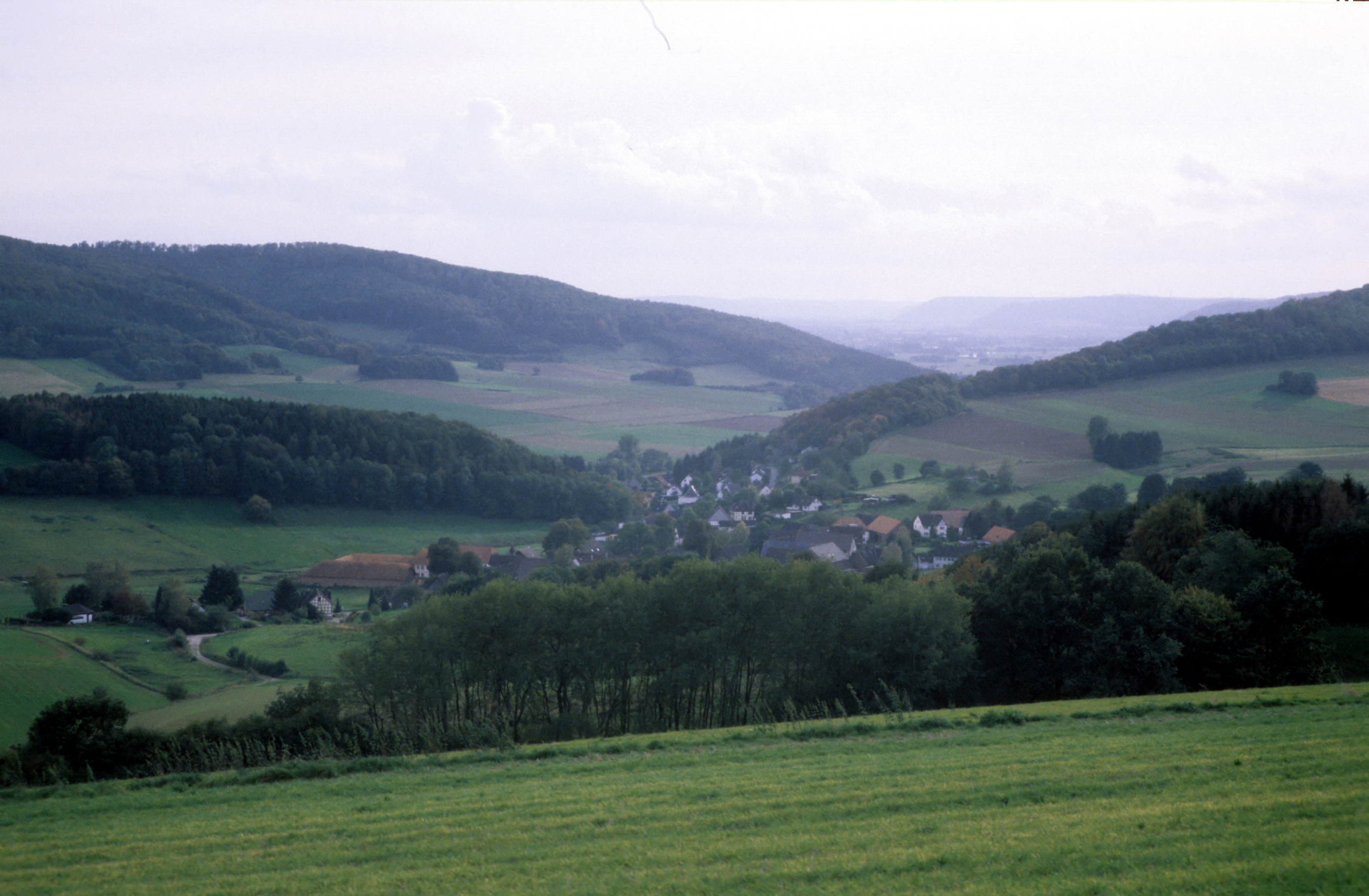 Blick vom Pass am Hangberg ins Wesertal. Vorne Dorf Lütgenade, links hinten der Burgberg